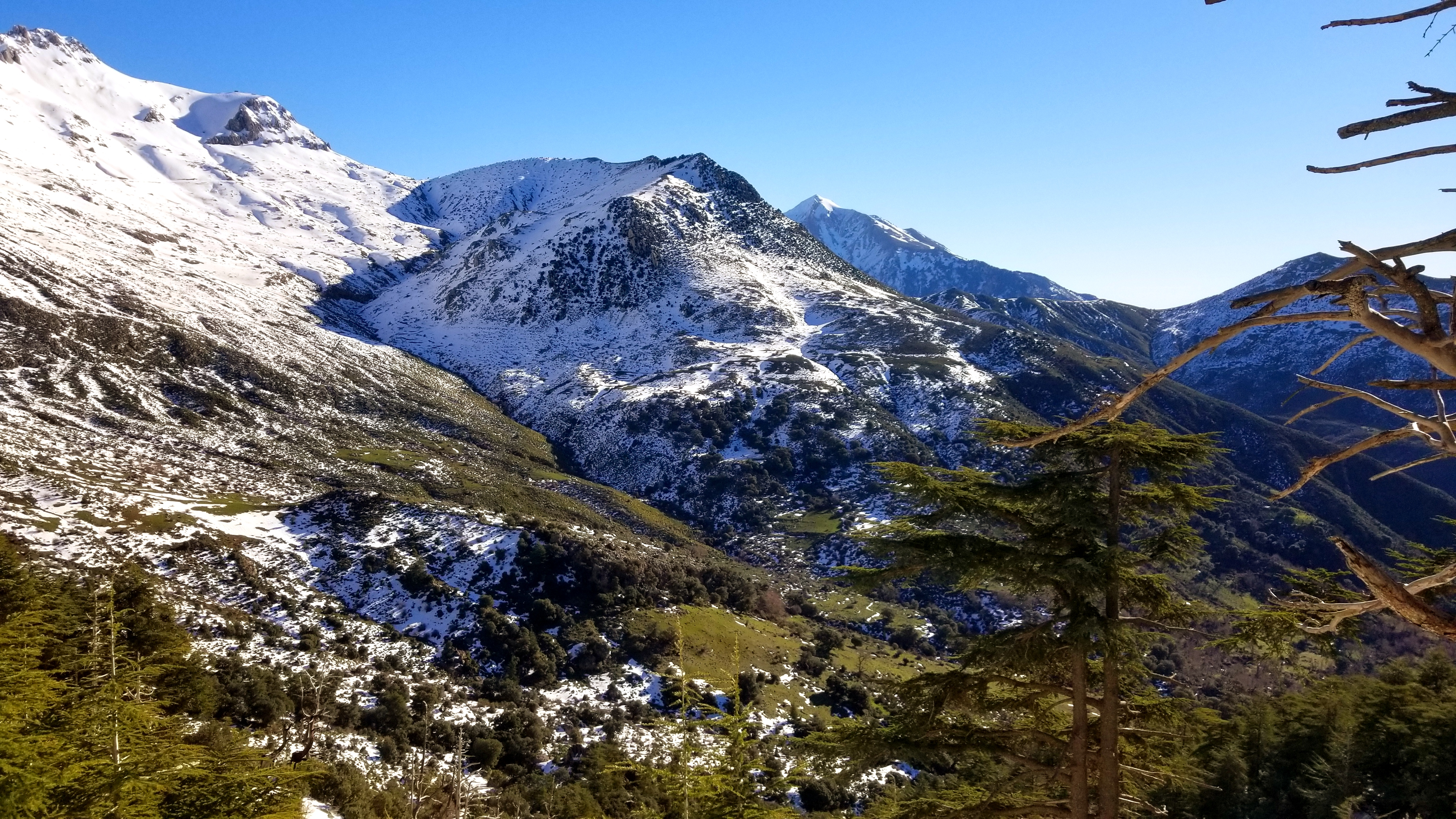 Montagne et neige de TIKJDA, W. BOUIRA